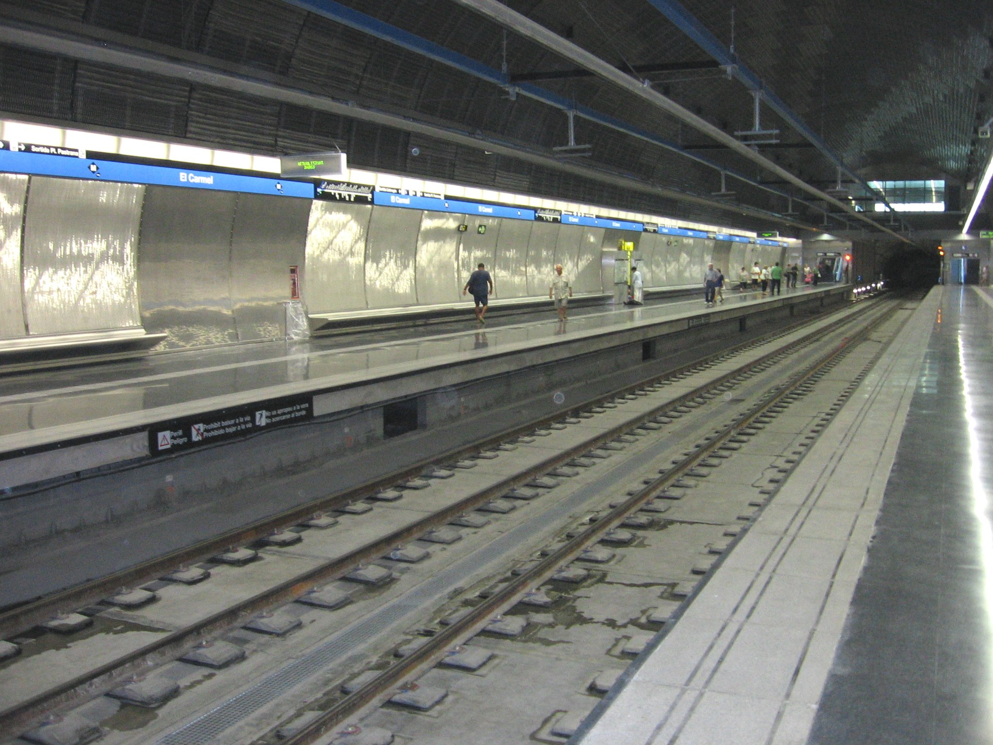 Estación de metro de El Carmel, distrito de Horta-Guinardó (Barcelona).